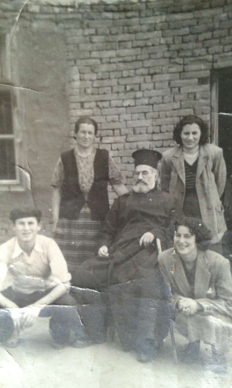 Васил Корунчев с част от семейството